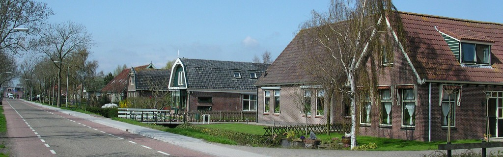 De kern van bewoning van Zittend. View of the hamlet Zittend.